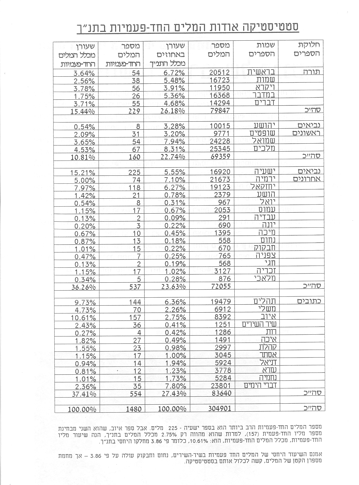 סטטיסטיקה של המילים היחידאיות בתנך